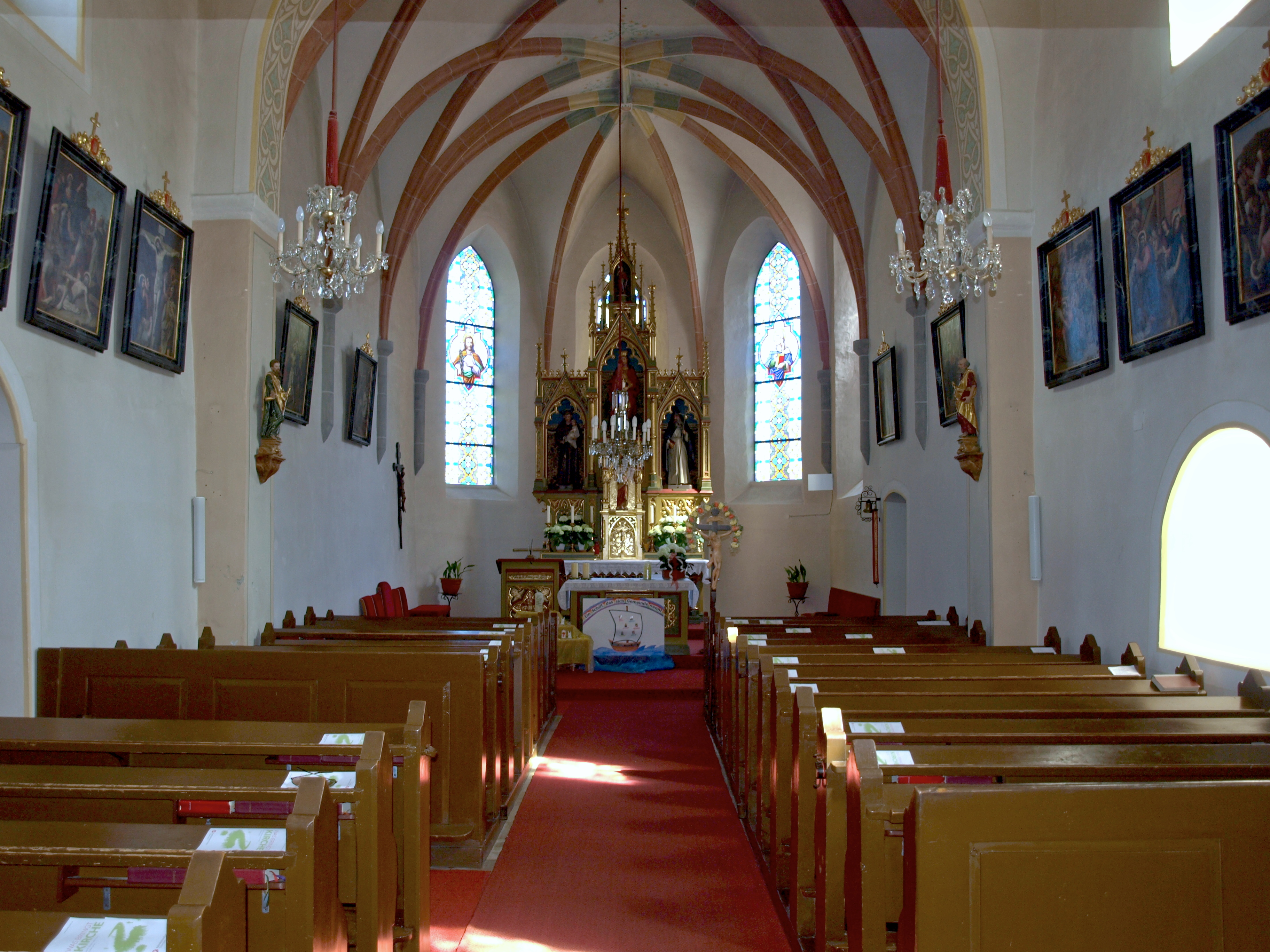 Kath. Pfarrkirche hl. Margarethe und Friedhof